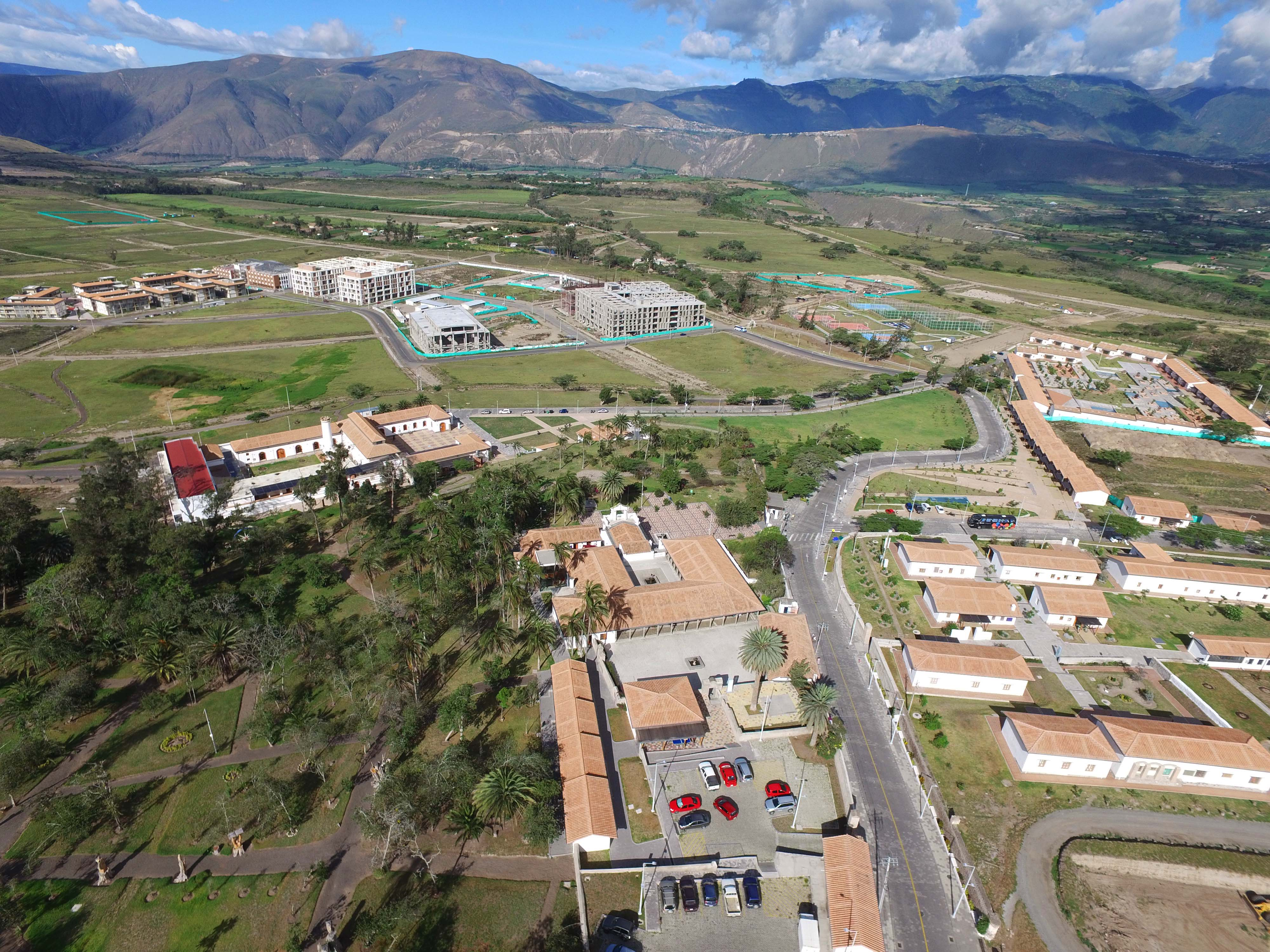 La Ciudad del Conocimiento en construcción continua